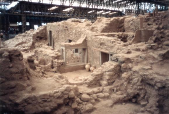 Archaeological site in Akrotiri, Santorini (ancient Thera)